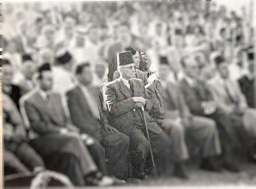 אחמד חילמי פשה בשורה הראשונה של נכבדי הוועד הערבי העליון